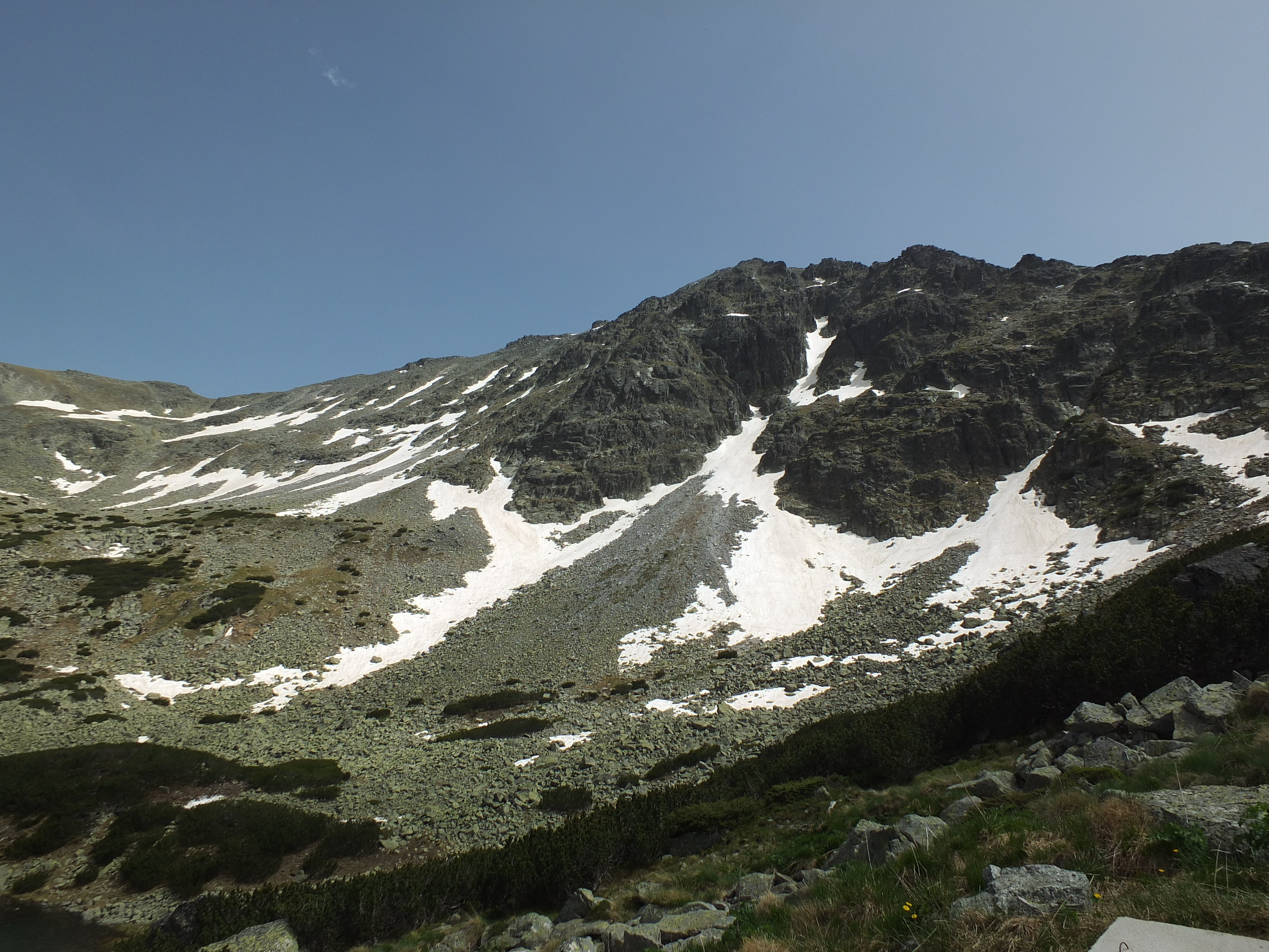 Рила, Рила Връх Иречек, над Каракашевото езеро